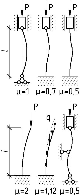 Коэффициент приведённой длины стержней для некоторых вариантов закрепления